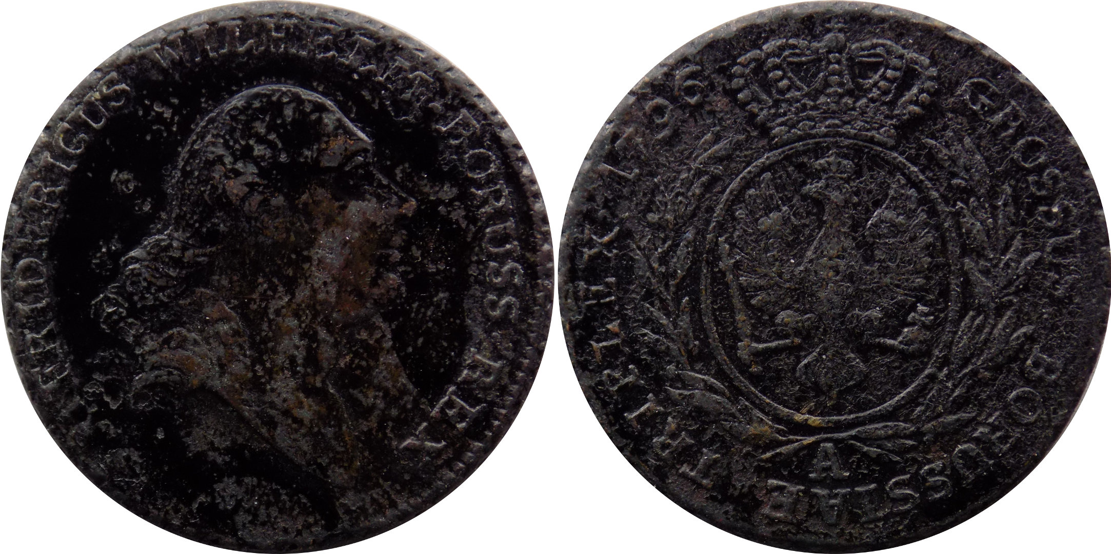 Prusy Południowe 3 grosze 1796 A